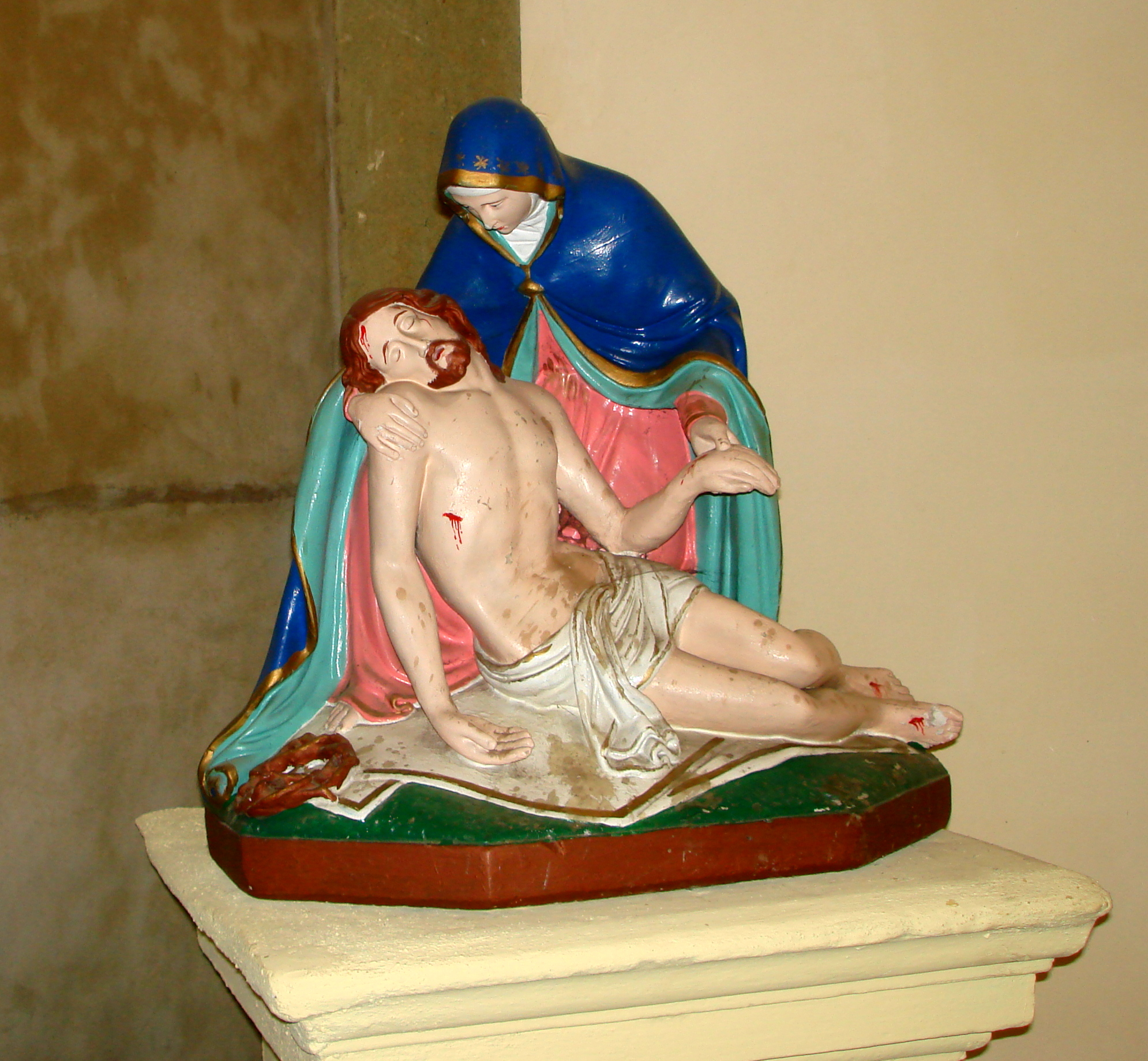 Kamienna Góra, Pieta w kaplicy cmentarnej.